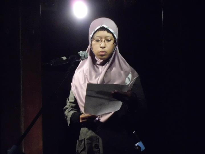 Siska Yuniati membaca puisi pada acara Sastra Bulan Purnama edisi ke-8 di Tembi Rumah Budaya pada 7 Mei 2012.